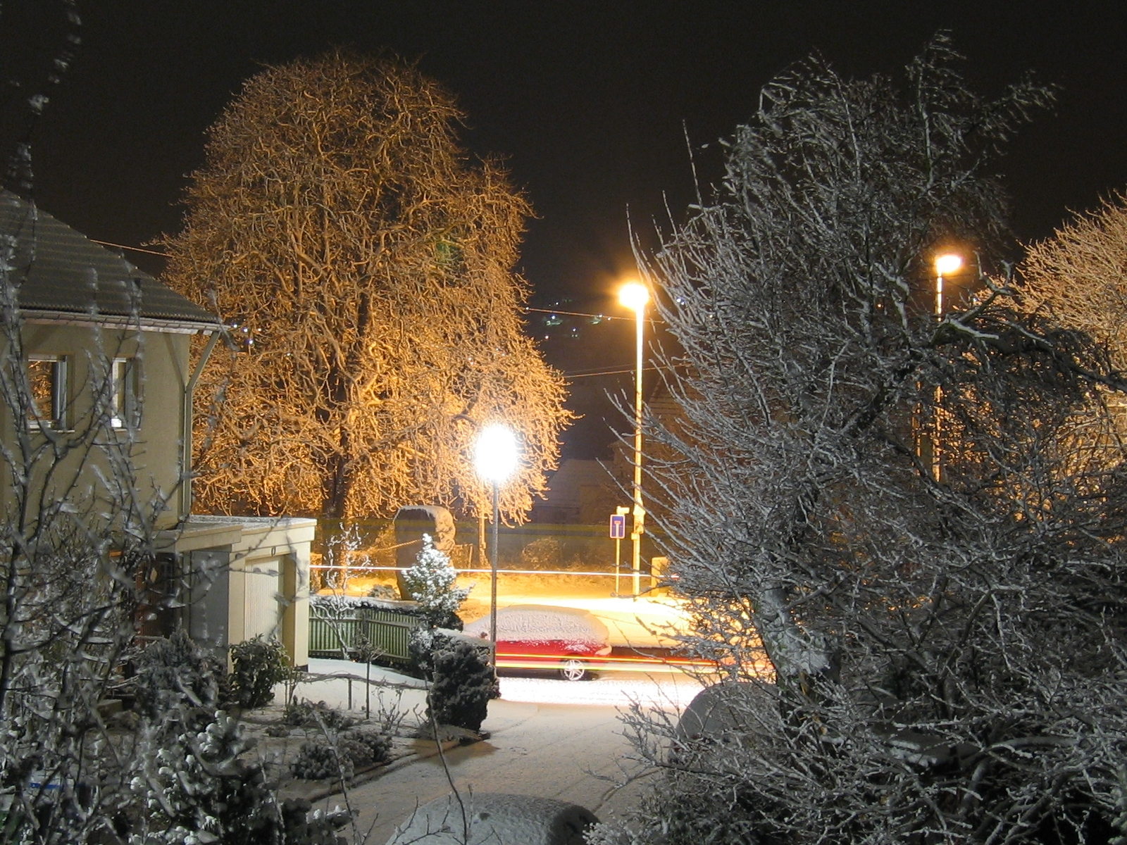 Snow scenery